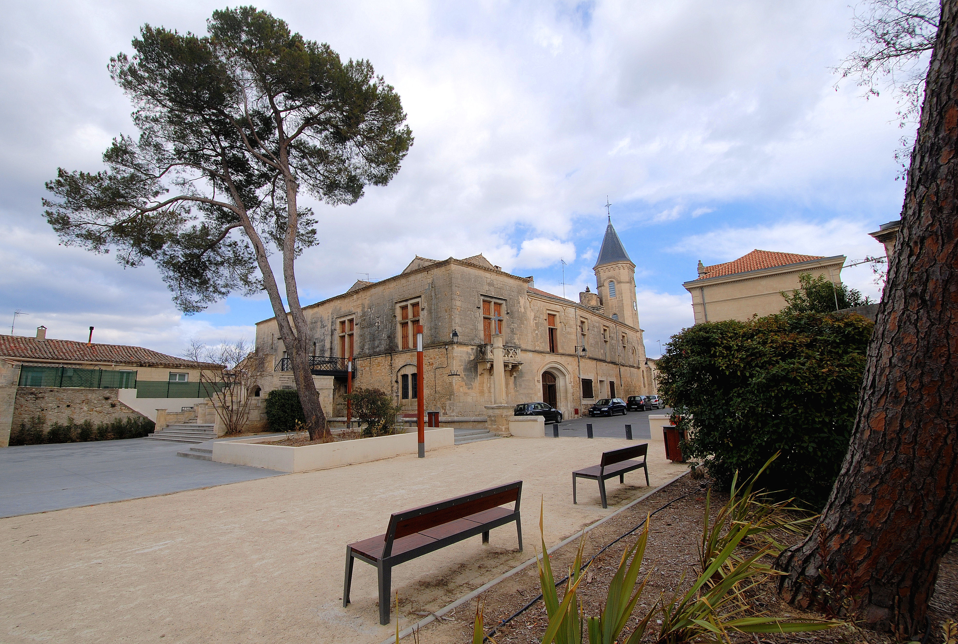 Parc municipal de Saint-Drézéry (Hérault, France).